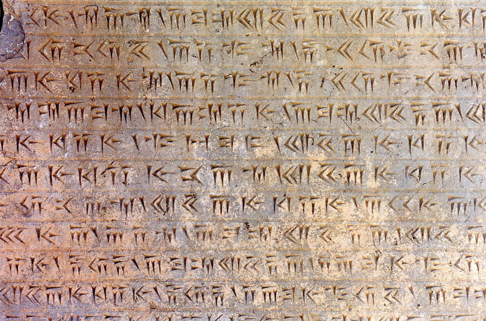 Persépolis (Iran). Inscription cunéiforme. VIe-Ve s. av. J.-C. Photo Ginolerhino 2002.